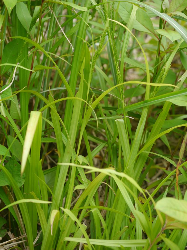 Carex ischnostachya：ジュズスゲ 2018/06/17 生石山、和歌山県：Mt. Oishi, Wakayama Pref. Japan